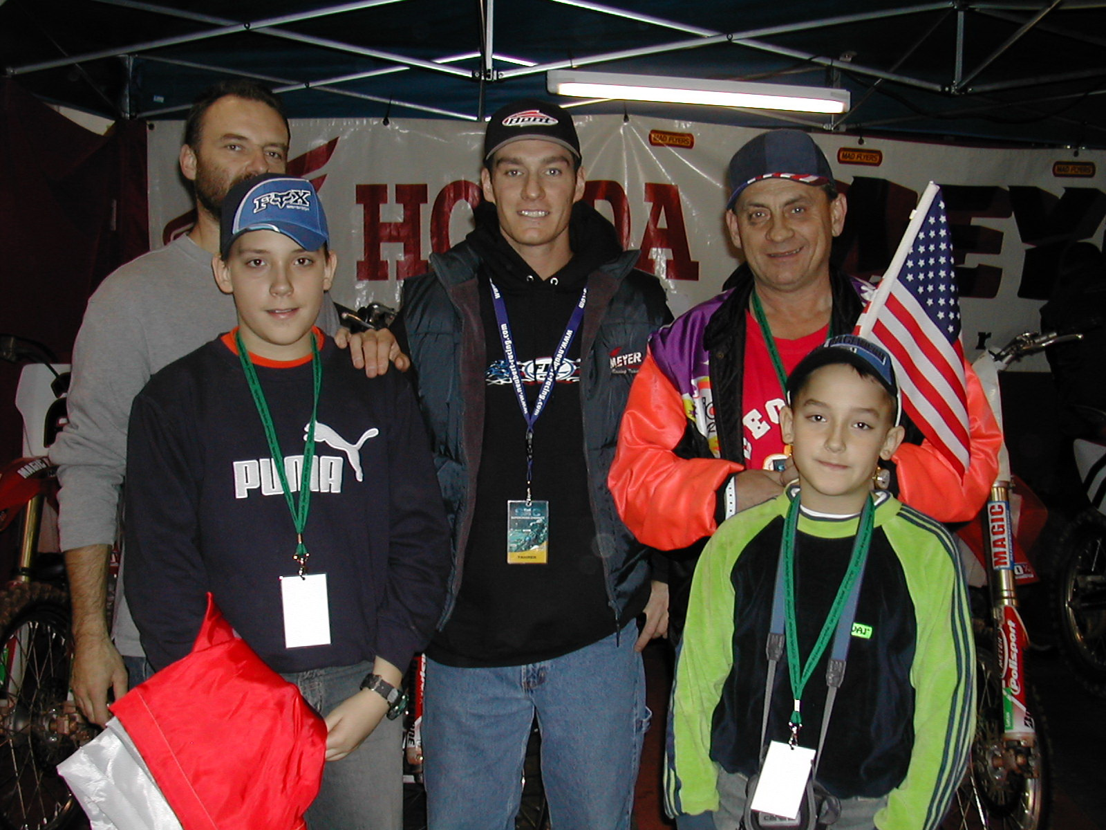 Суперкрос. Німеччина, Хемніц, 22-23.11.2003